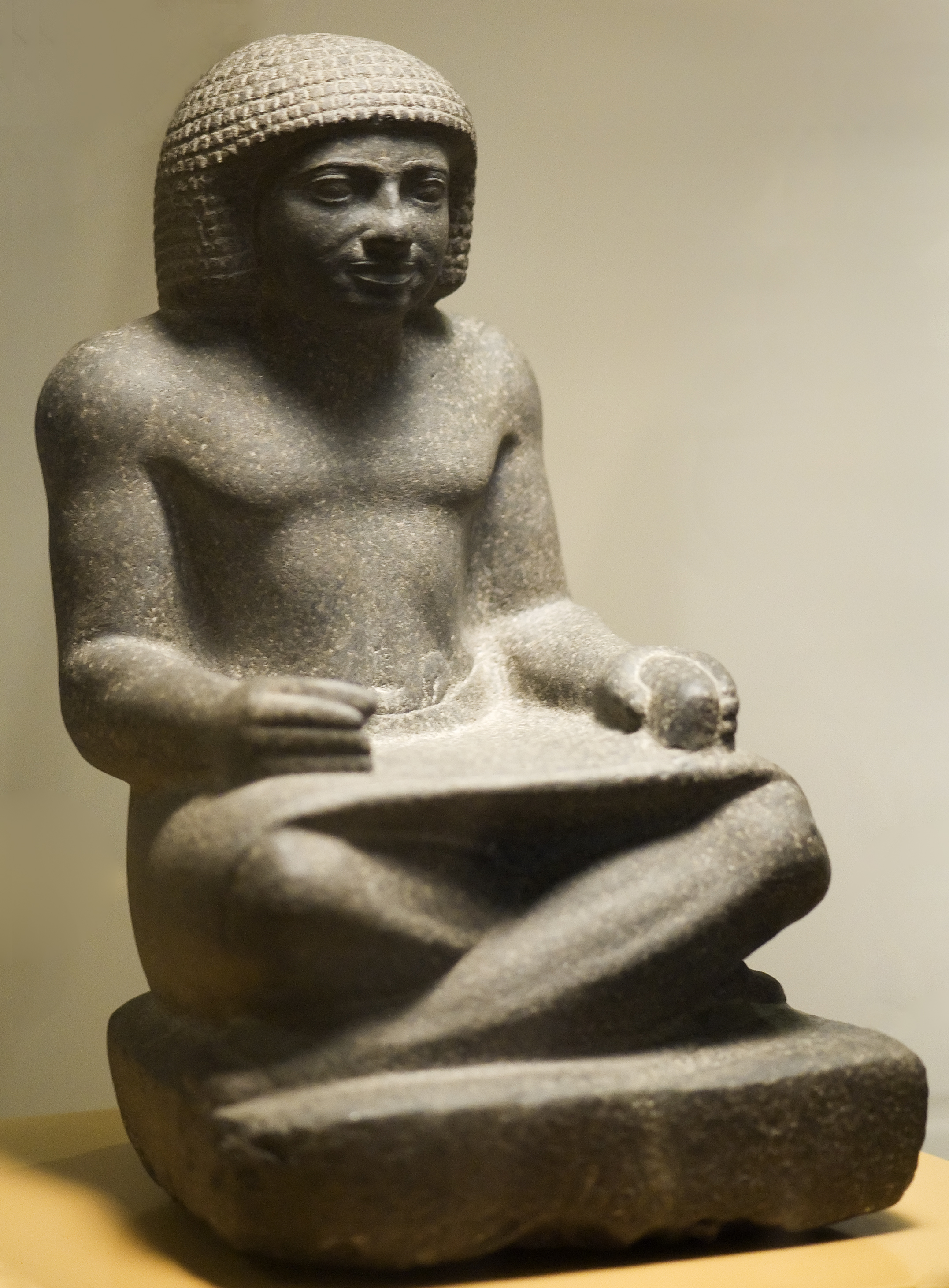 Beeld van een Egyptische schrijver Beeld van een Egyptische schrijver (2465-2323 BC, Egypt, RMO Leiden Netherlands)